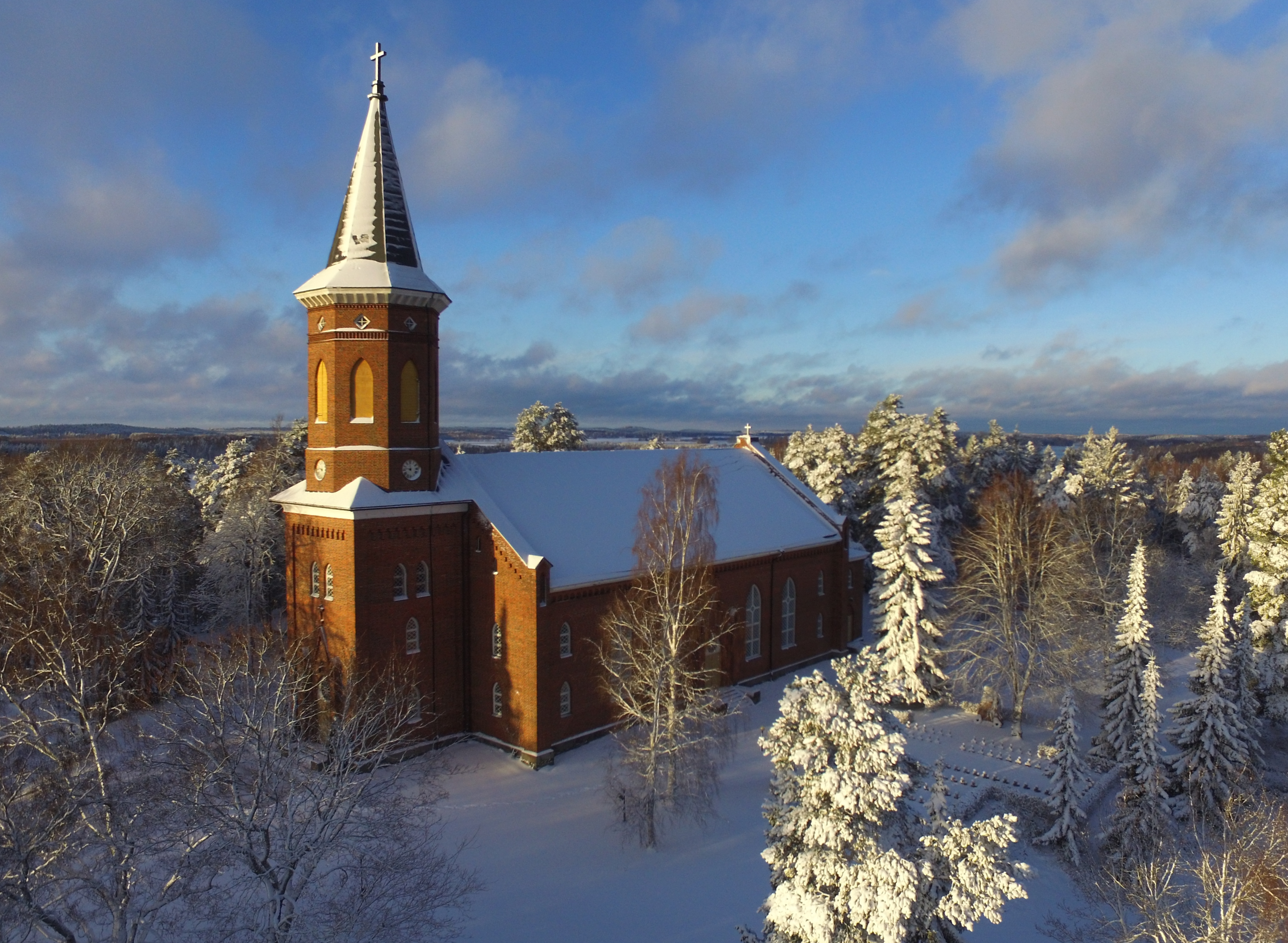 Hattulan uusi kirkko joulukuussa 2017